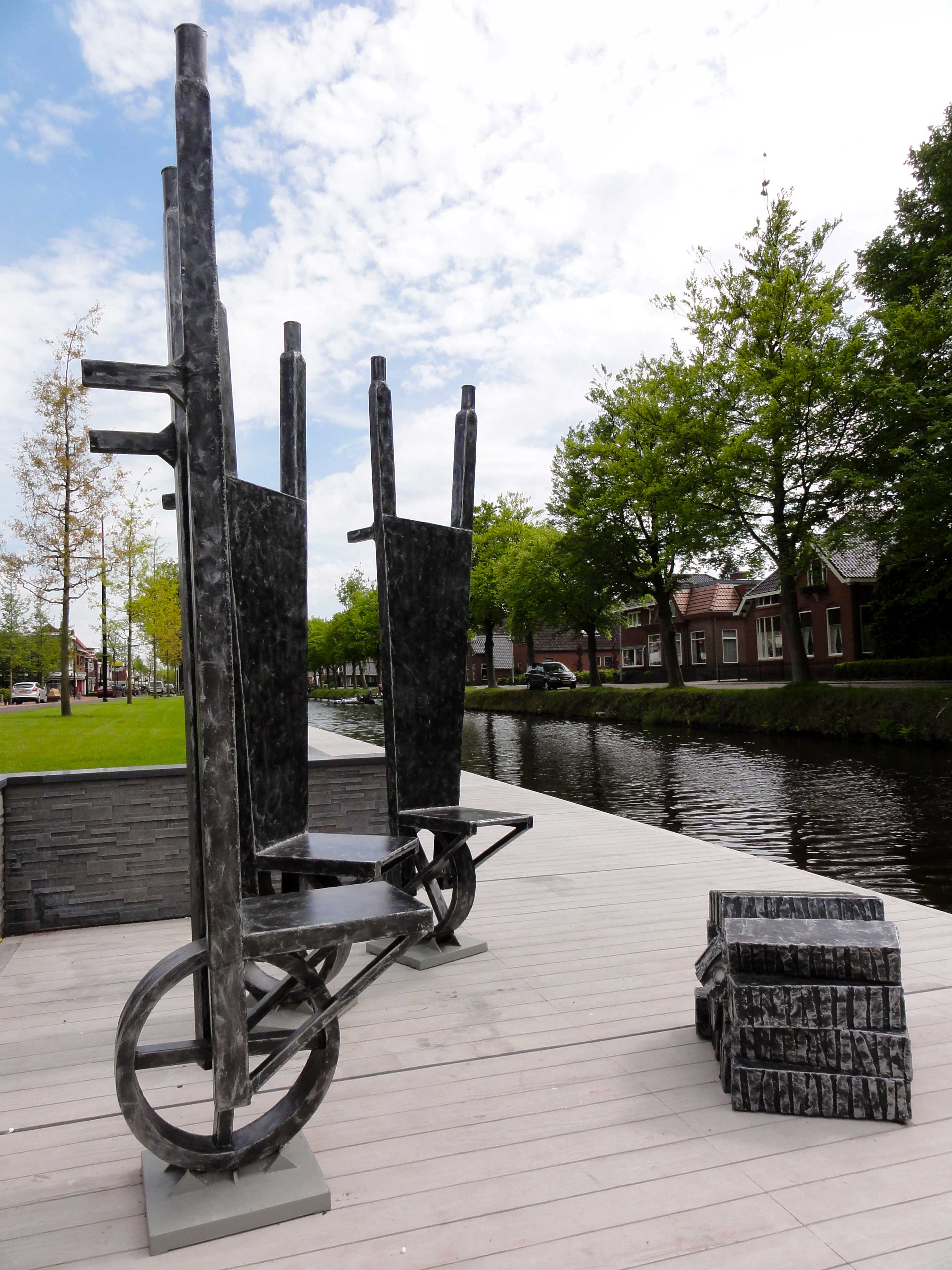 Turven tronen (Kruiwagens) door Hans Mes - Hoofdstraat Stadskanaal